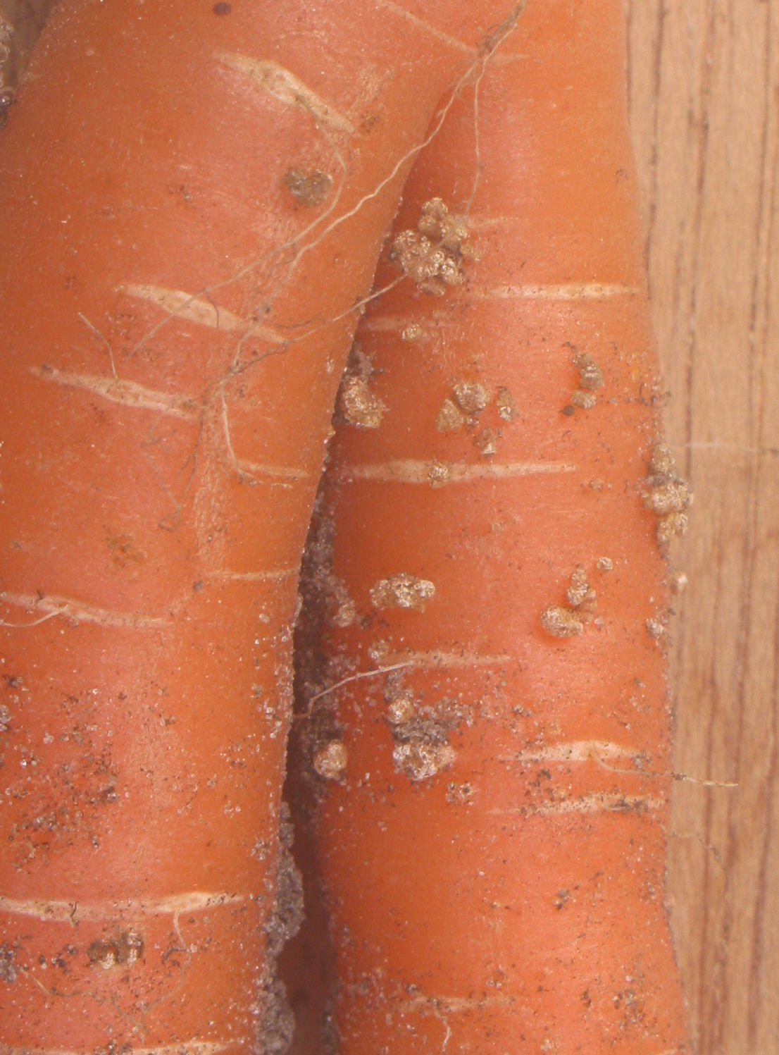 Meloidogyne chitwoodi op Wortel Daucus carota 'Amsterdamse Bak' (maiswortelknobbelaaltje)